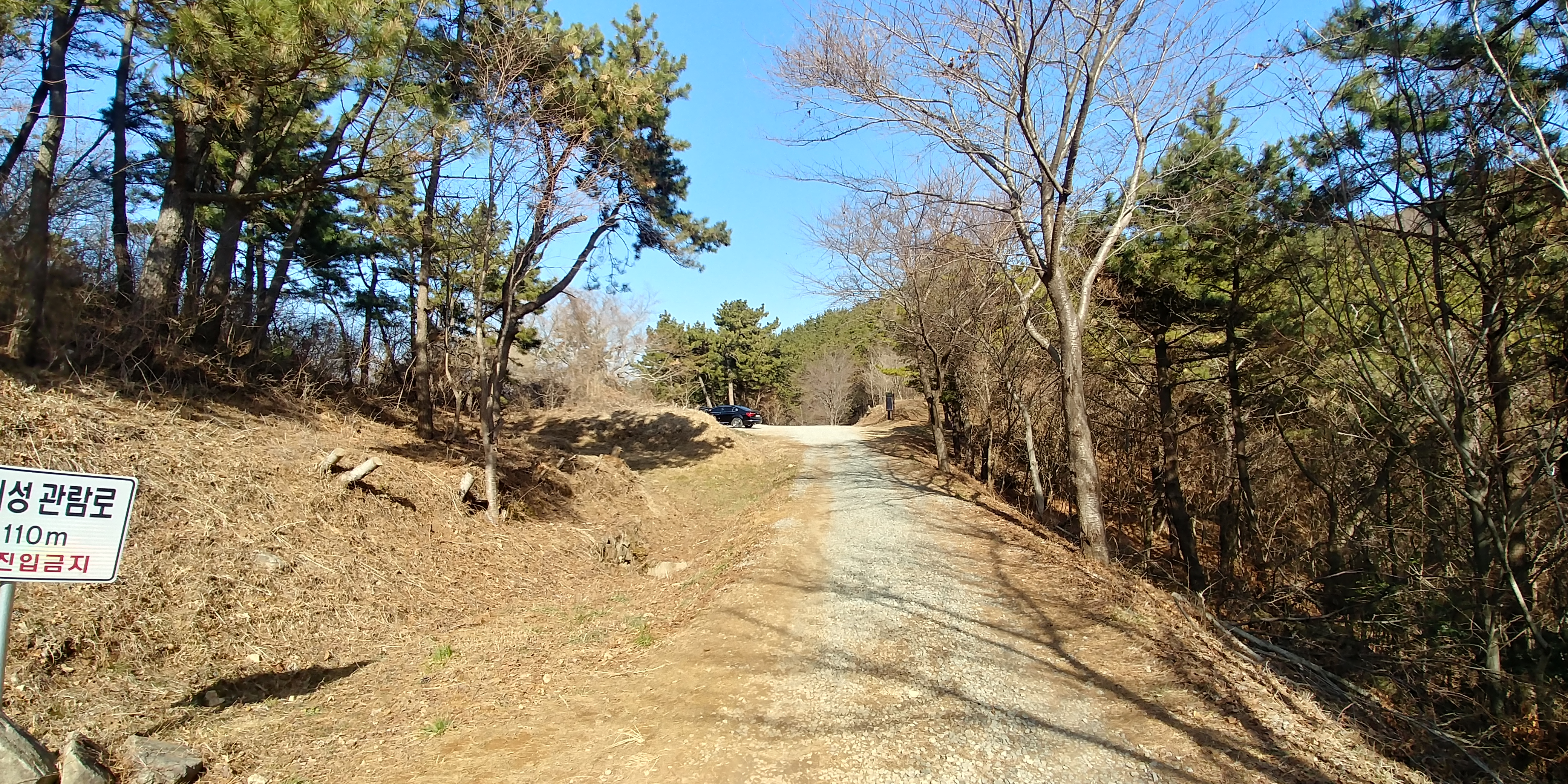 둔덕기성에 있는 간이 주차장